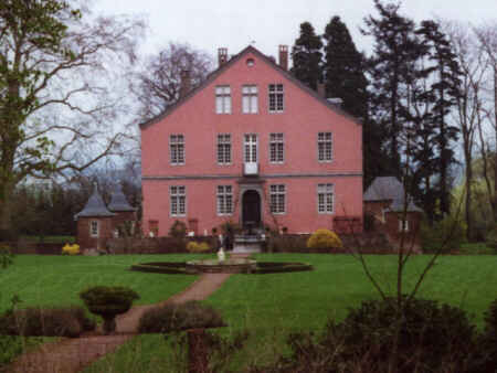 Die Kitzburg in Walberberg, Ansicht aus dem Park